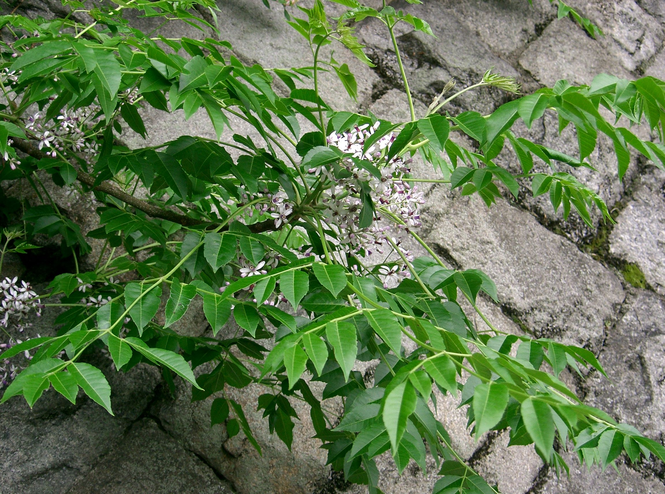 Melia azederach